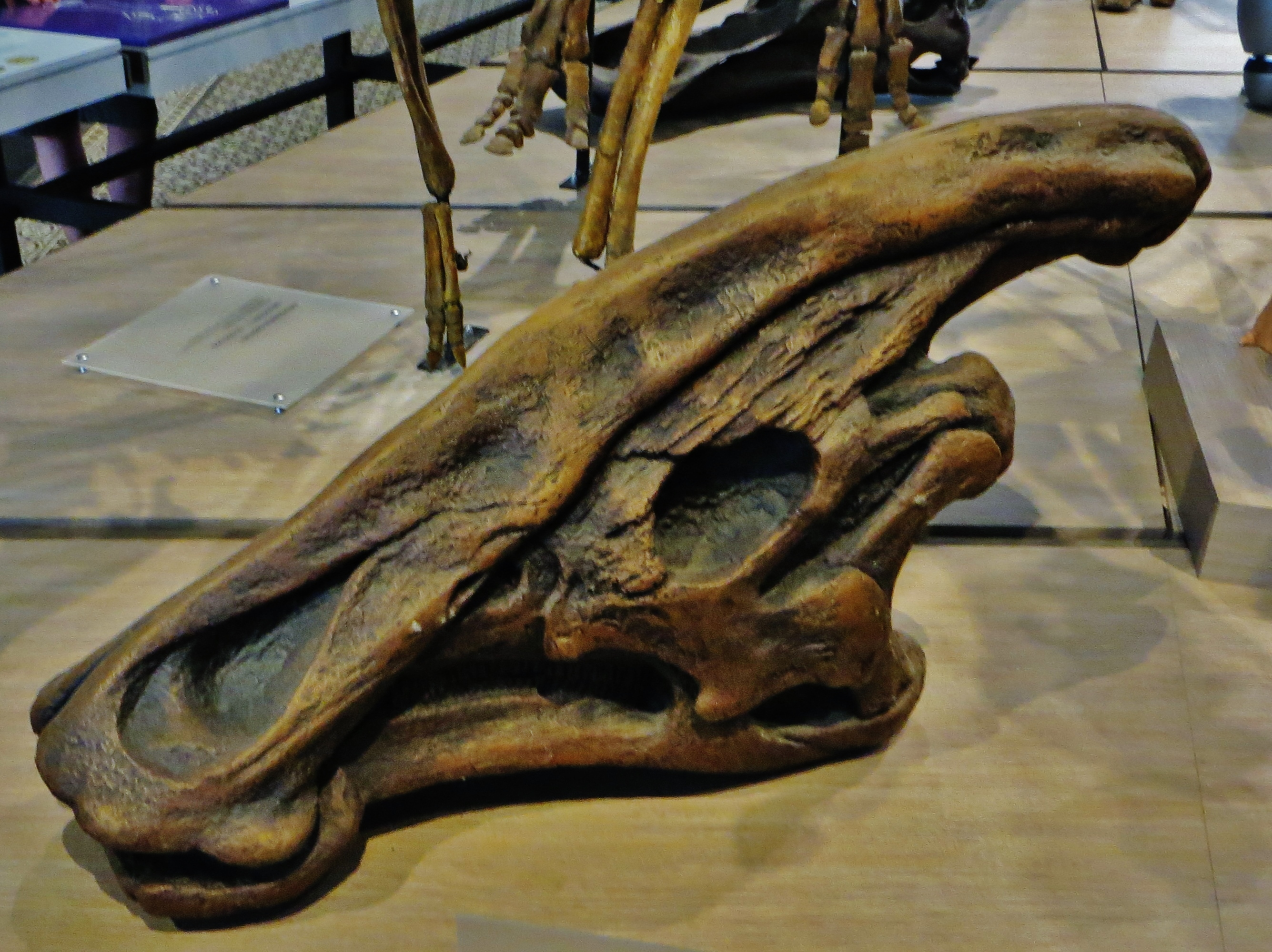 Fossil - Took The picture at Royal Belgian Institute of Natural Sciences, Brussels